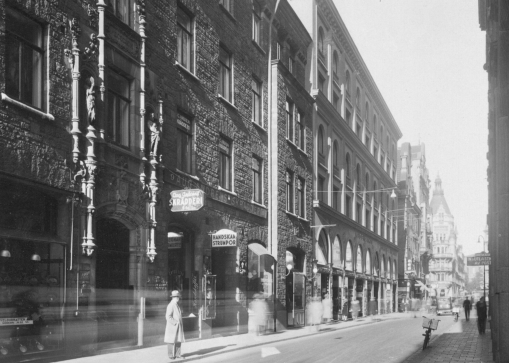 Fastigheten Vildmannen 7, Biblioteksgatan